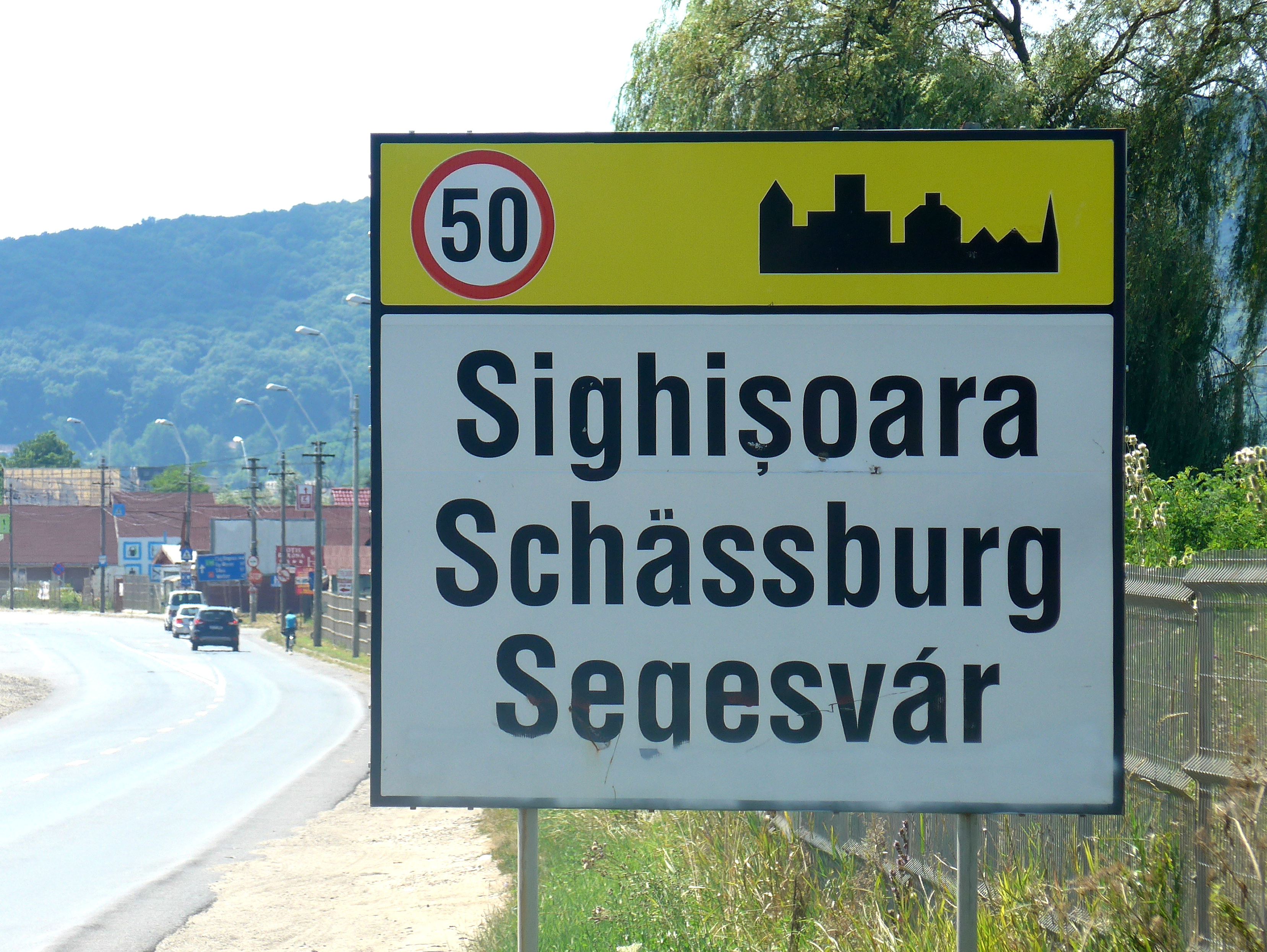 Amtliches dreisprachiges (Rumänisch, deutsch, ungarisch) Ortseingangsschild von Sighisoara/Schäßburg in Siebenbürgen (Rumänien)